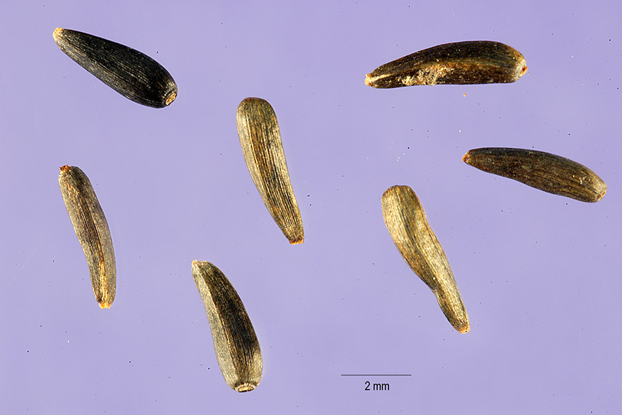 Guizotia abyssinica achenes